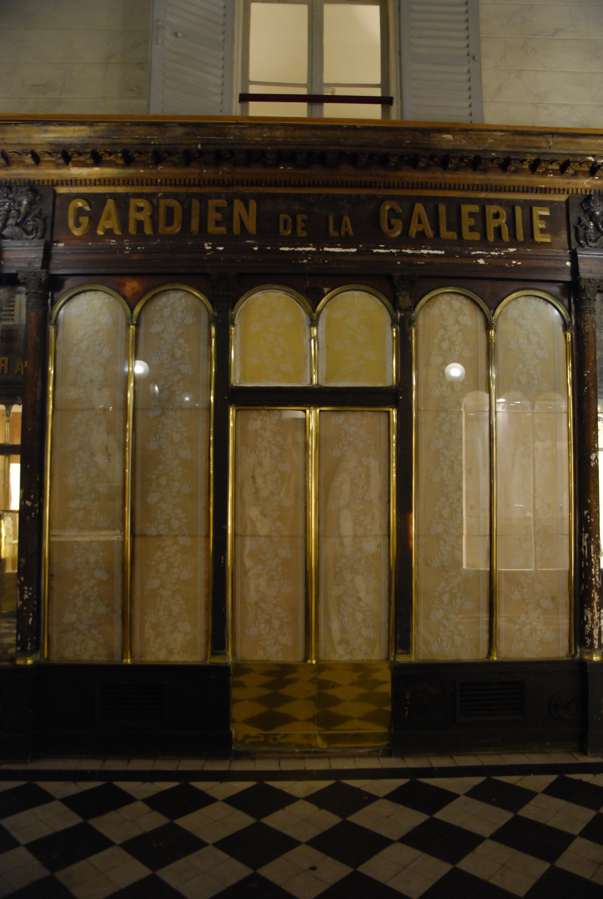 Galerie Véro-Dodat